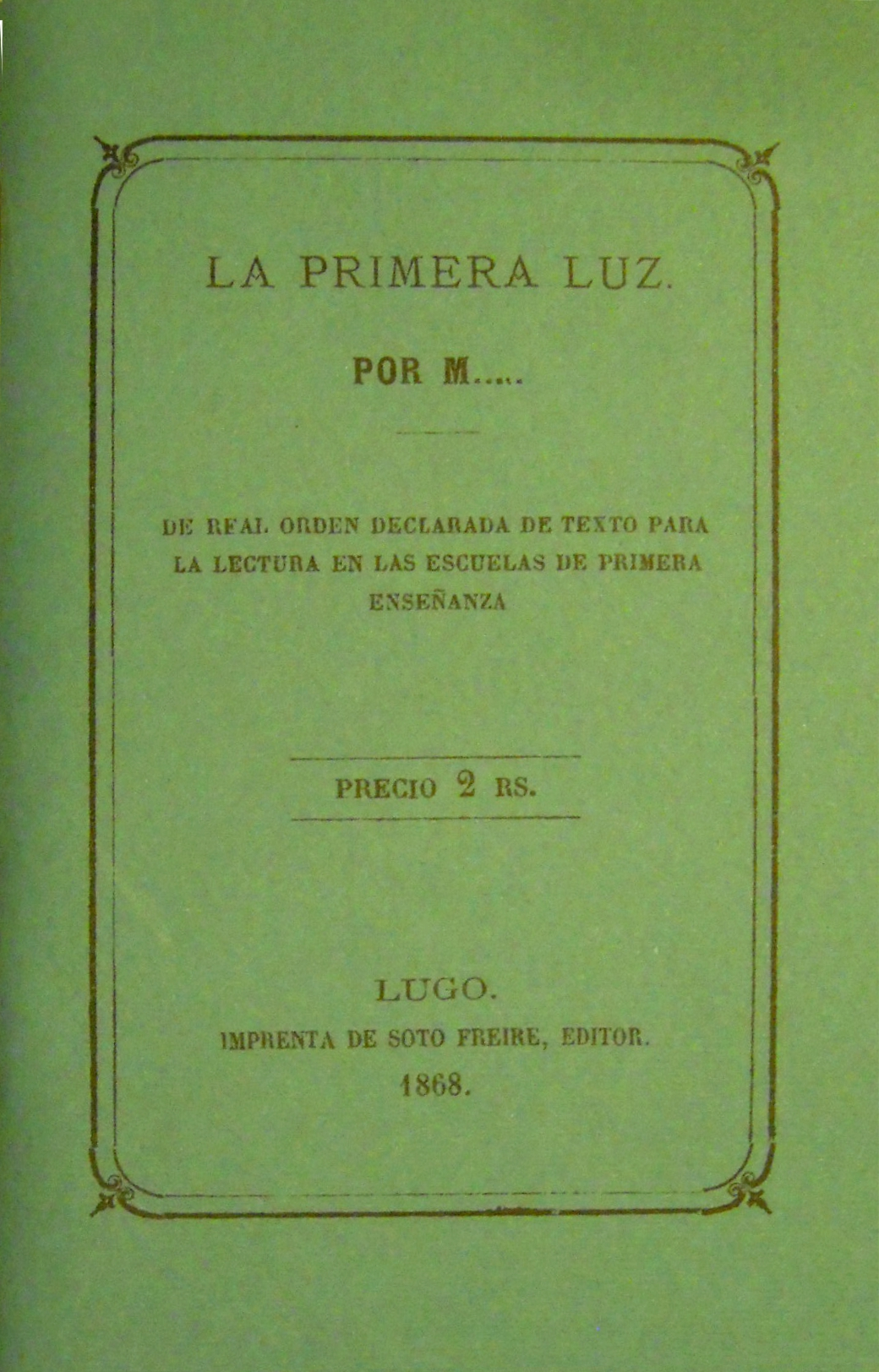 Portada facsímile da segunda edición de La Primera Luz (1859), de Manuel Murguía, co seguinte texto: LA PRIMERA LUZPOR M.....DE REAL ORDEN DECLARADA DE TEXTO PARALA LECTURA EN LAS ESCUELAS DE PRIMERAENSEÑANZAPRECIO 2 RS.LUGOIMPRENTA DE SOTO FREITE, EDITOR1868